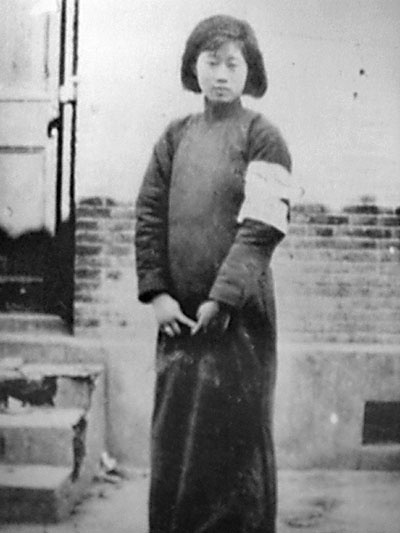 粵語: 沈光漢將軍夫人吳書蘭女士，喺抗日義勇軍服務。